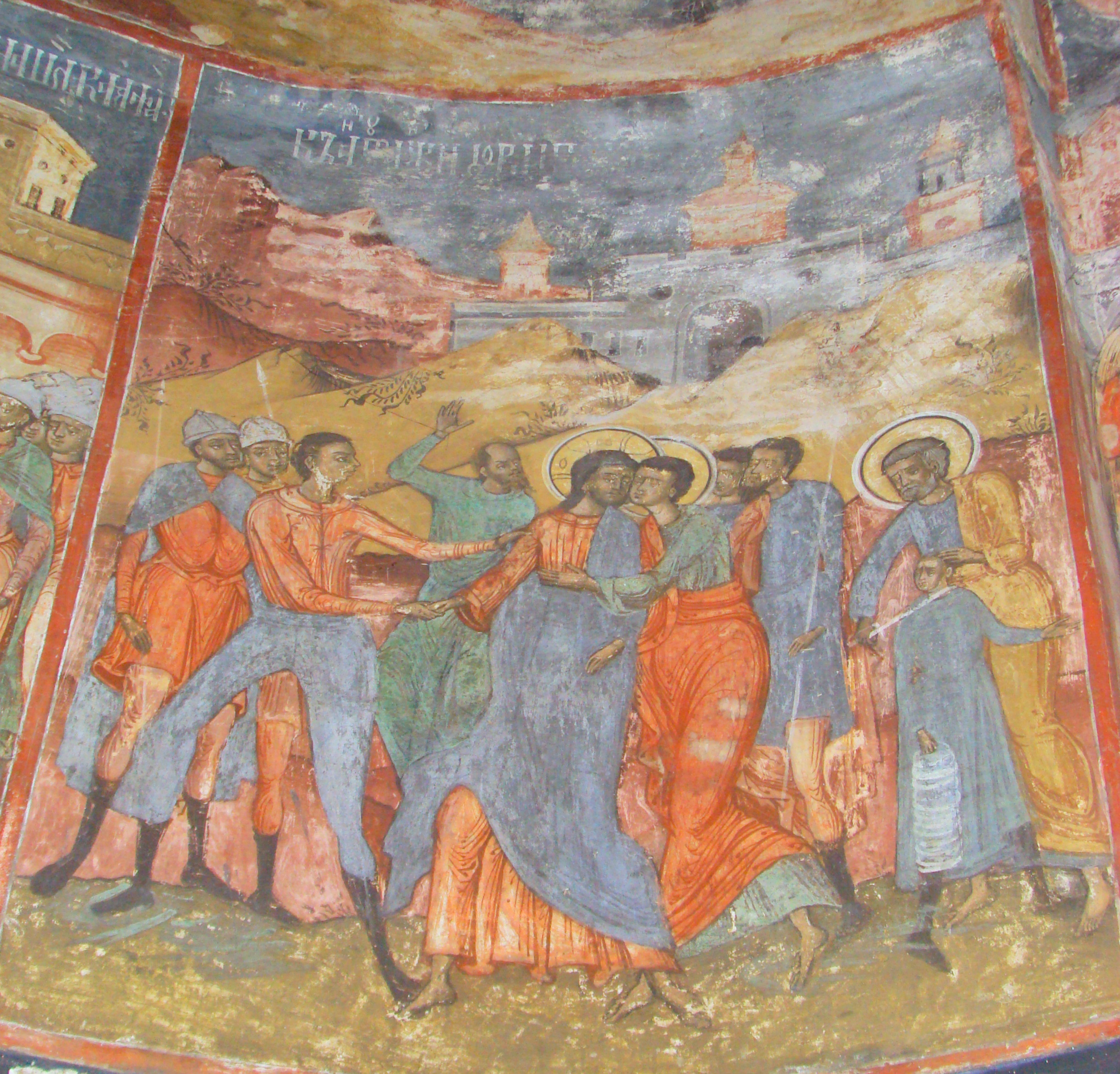 Biserica „Sfânta Treime”, sat Cerneți; comuna Șimian